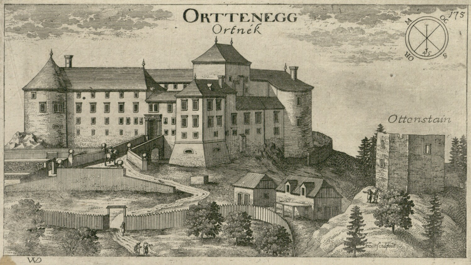 Ortneški grad (tudi Stari grad